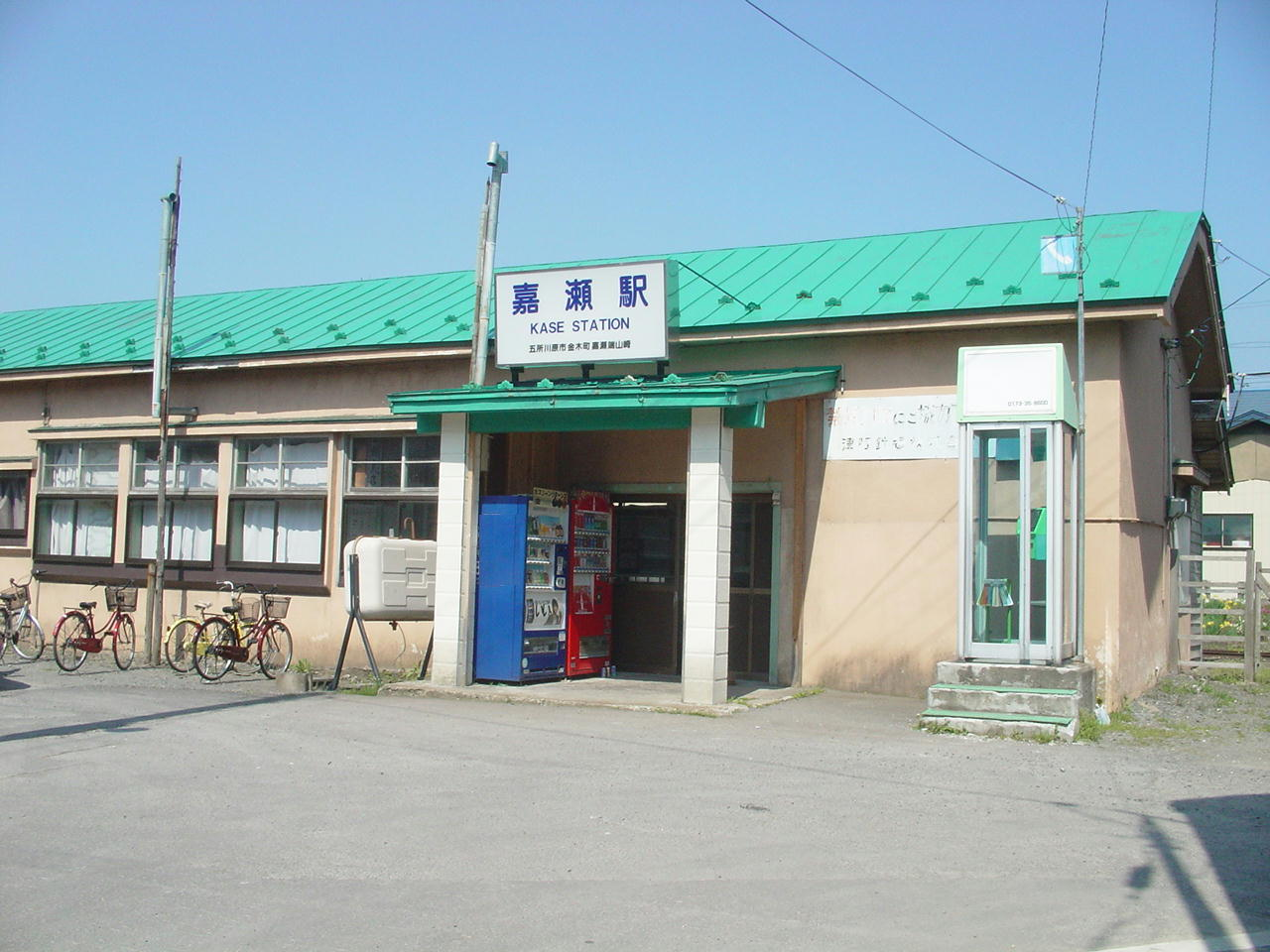 （津軽鉄道線嘉瀬駅）